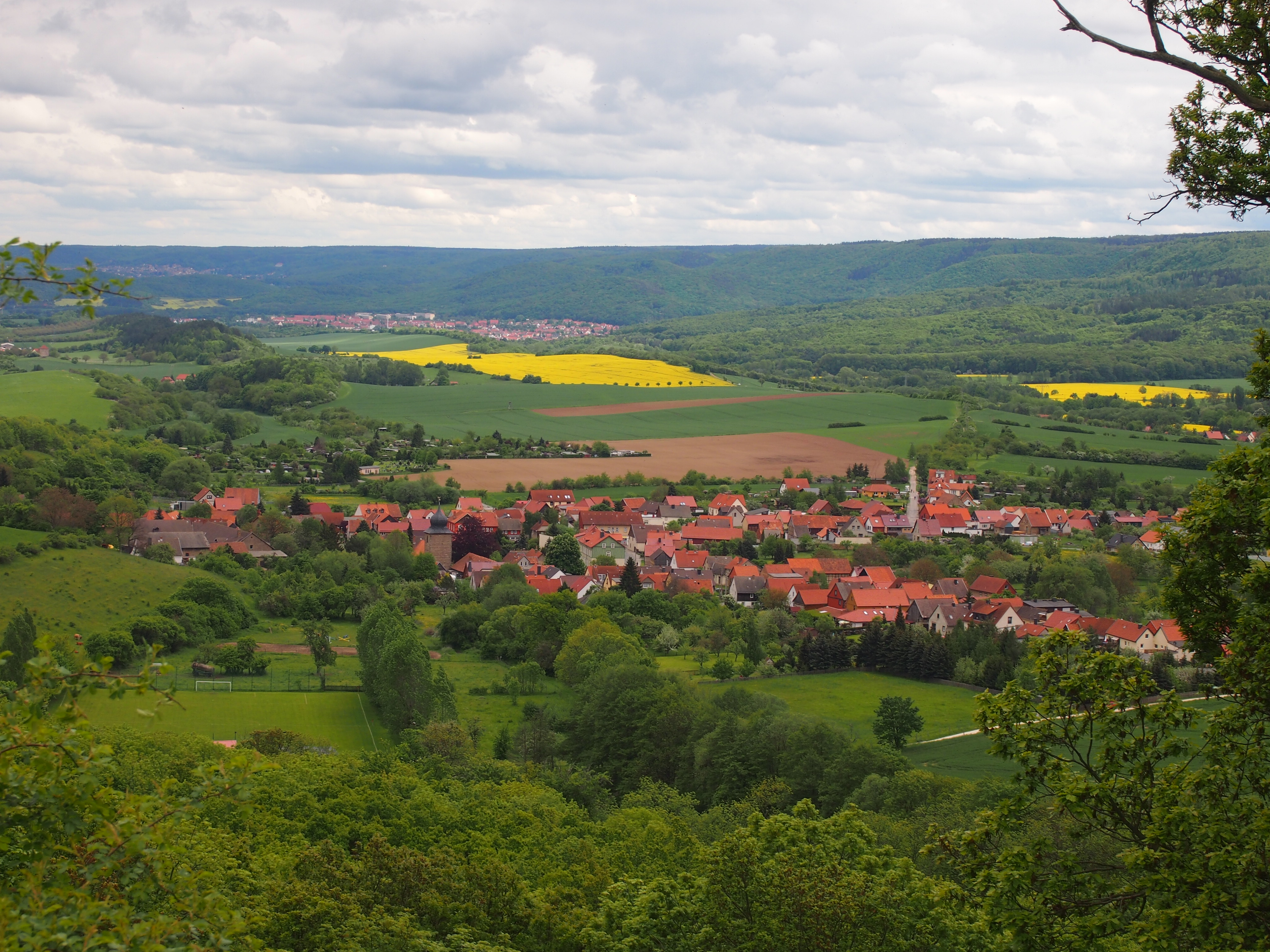 Aussicht von der Luisenburg auf Cattenstedt, Gemeinde Blankenburg (Harz)